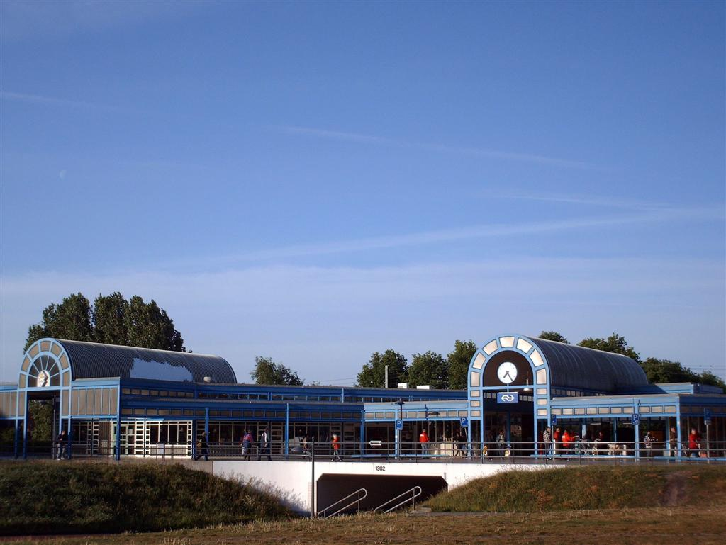 Station Heerenveen